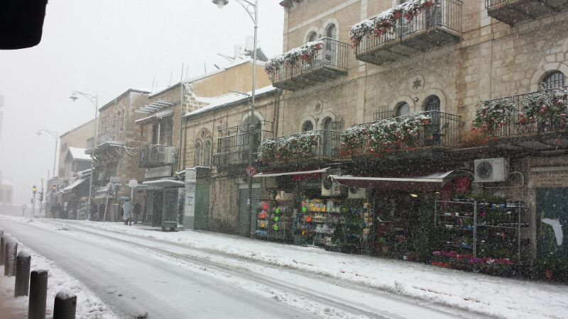 שלג בירושלים - סופת שלגים אחת הגדולות, ב-12 בדצמבר 2013 רחוב אגריפס